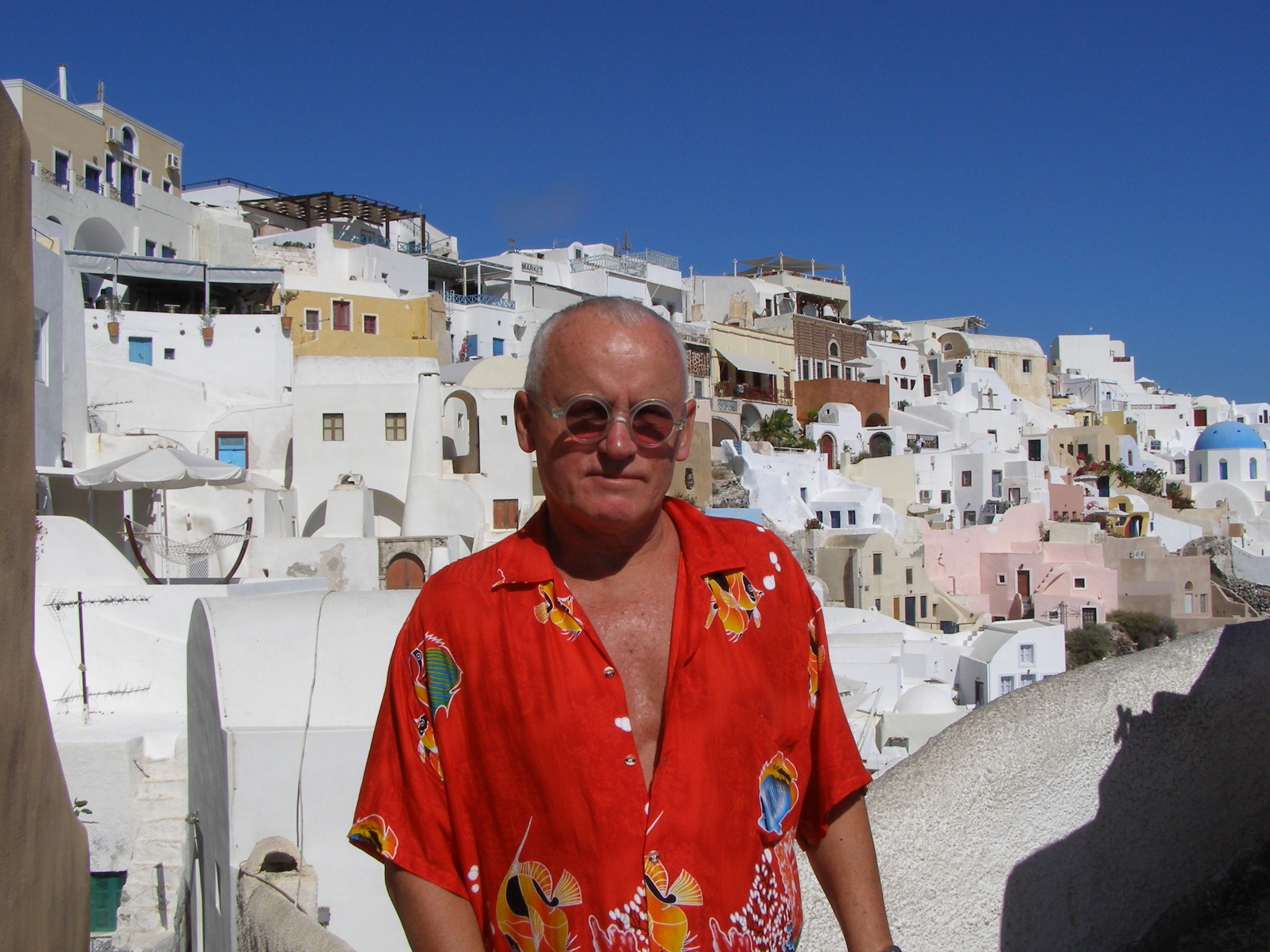 Vilen Künnapu Santorinil.